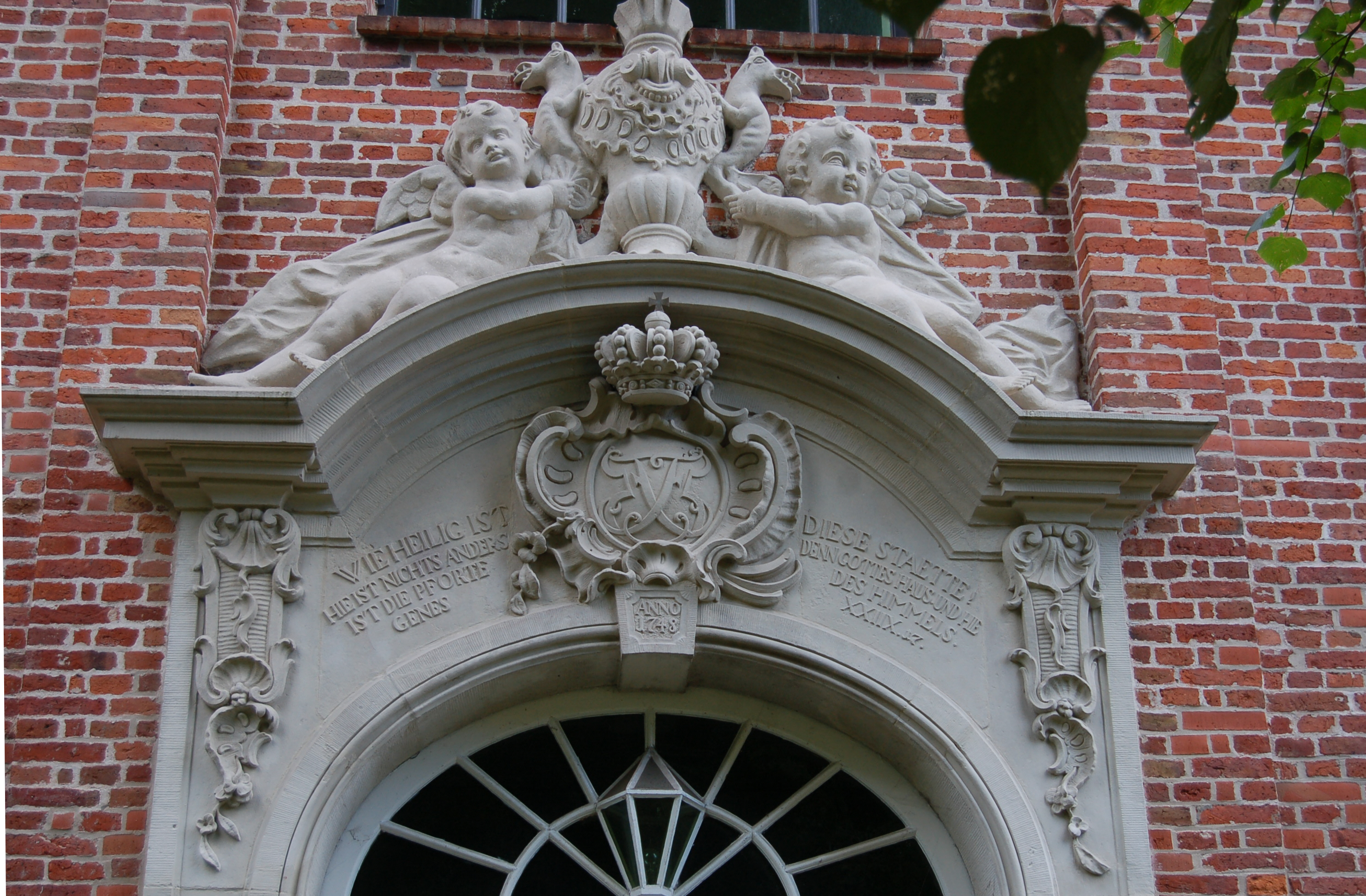 Sandstensrelief med Frederik V af Danmark og Norges kronede spejlmonogram samt årstallet 1748. Fra Yttersen (Uetersen) klosterkirkes nordportal